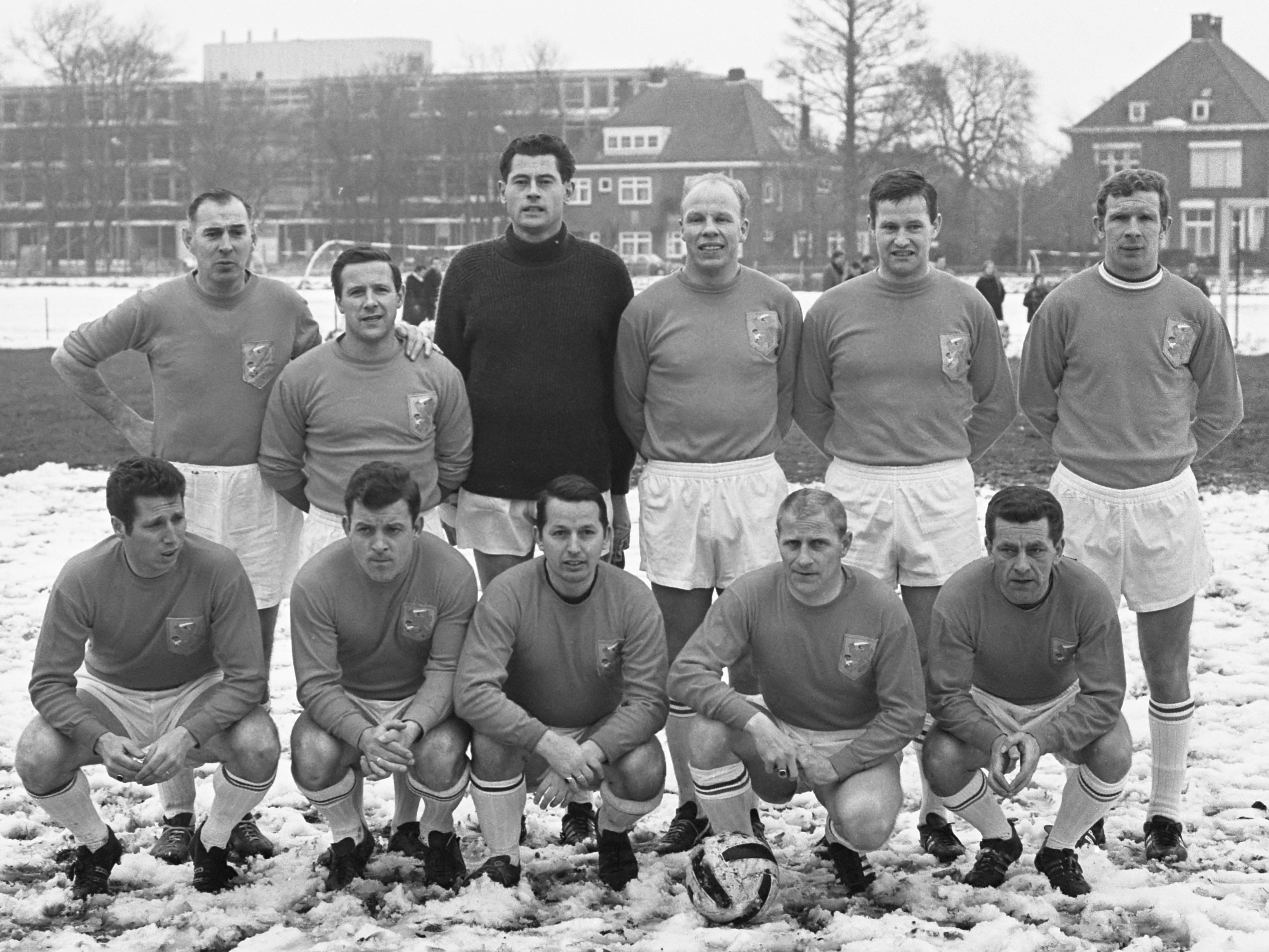 Oud-internationals tegen Koninklijke HFC. Elftal oud-internationals. Staand vlnr. Rinus Schaap, Tinus Bosselaar, Otto Roffel, Roel Wiersma, Kees Kuijs, Hans Kraay. Gehurkt vlnr: Tony van der Linden, Reinier "Beertje" Kreijermaat, Henk Schouten, Dick Tol, Mick Clavan 1 januari 1969